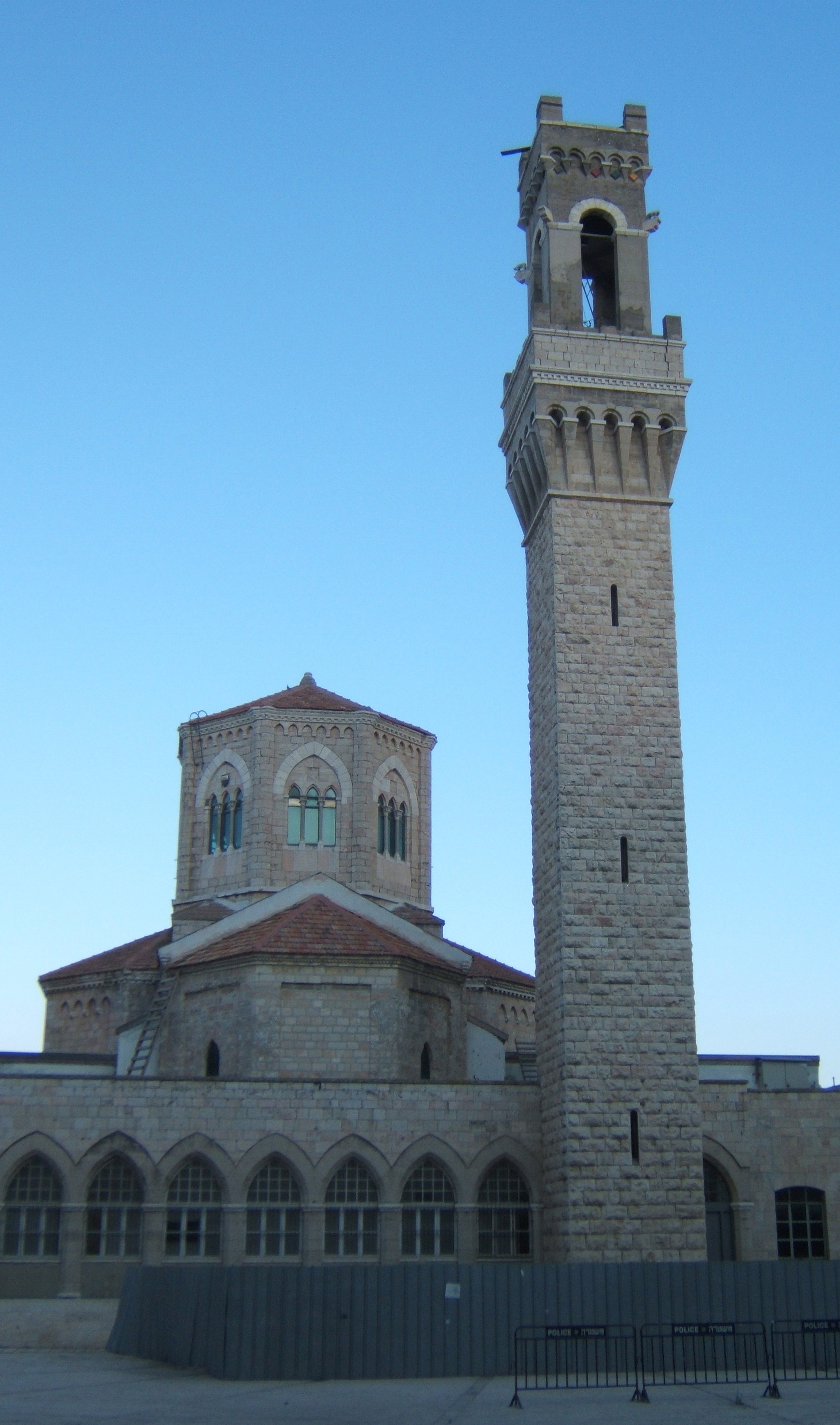 Italian Hospital, Jerusalem